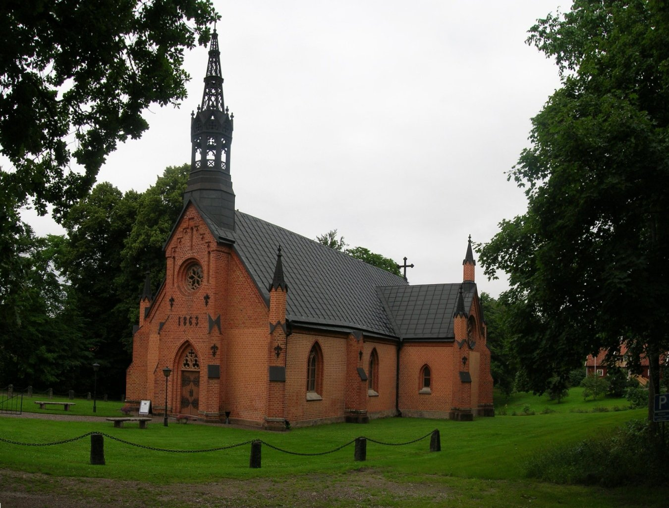 Taxinge kyrka, Taxinge, Strängnäs stift, Sverige